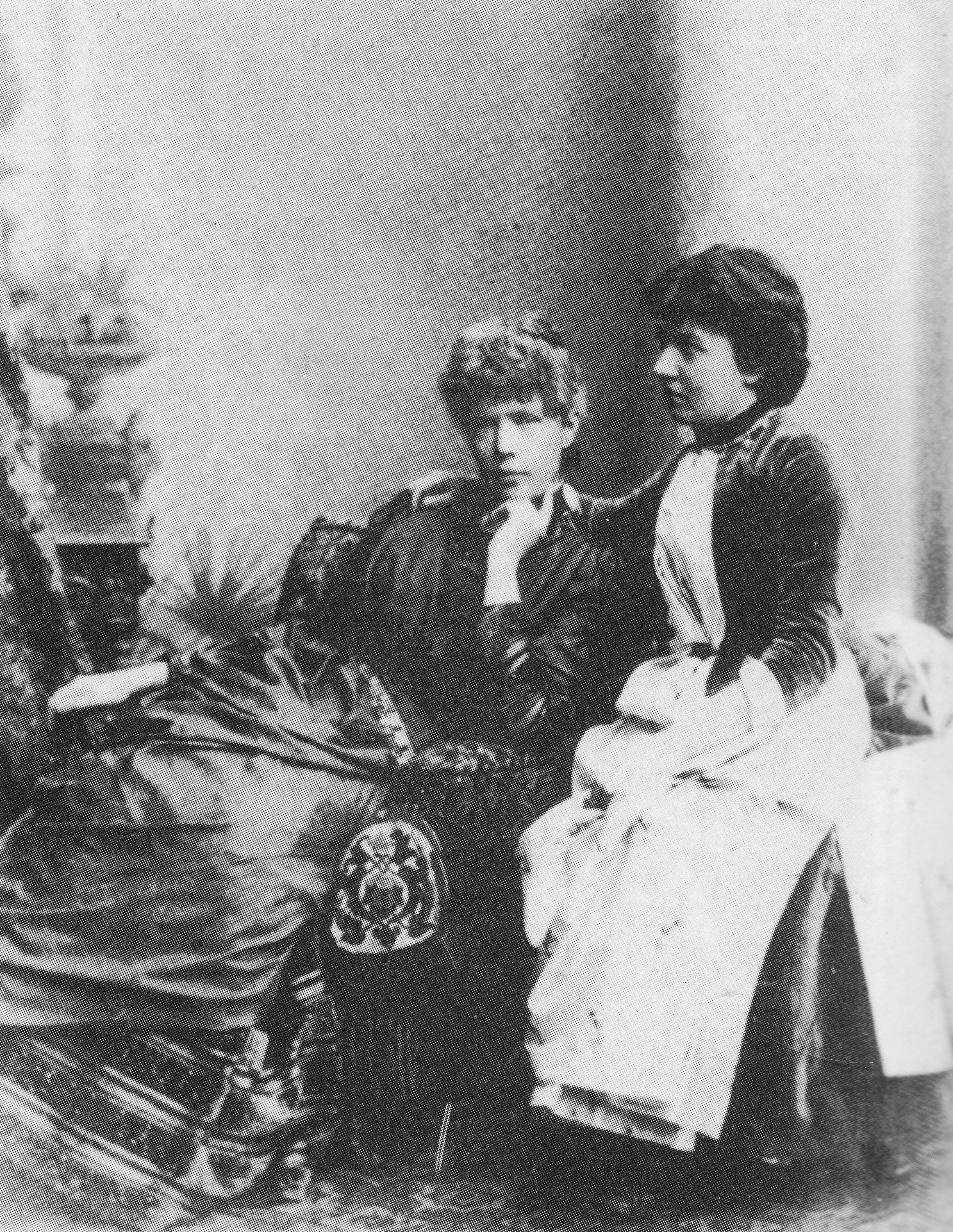 Anne Charlotte Leffler en Sofia Kovalevskaja (eerste vrouwelijke hoogleraar wiskunde aan Universiteit Stockholm)